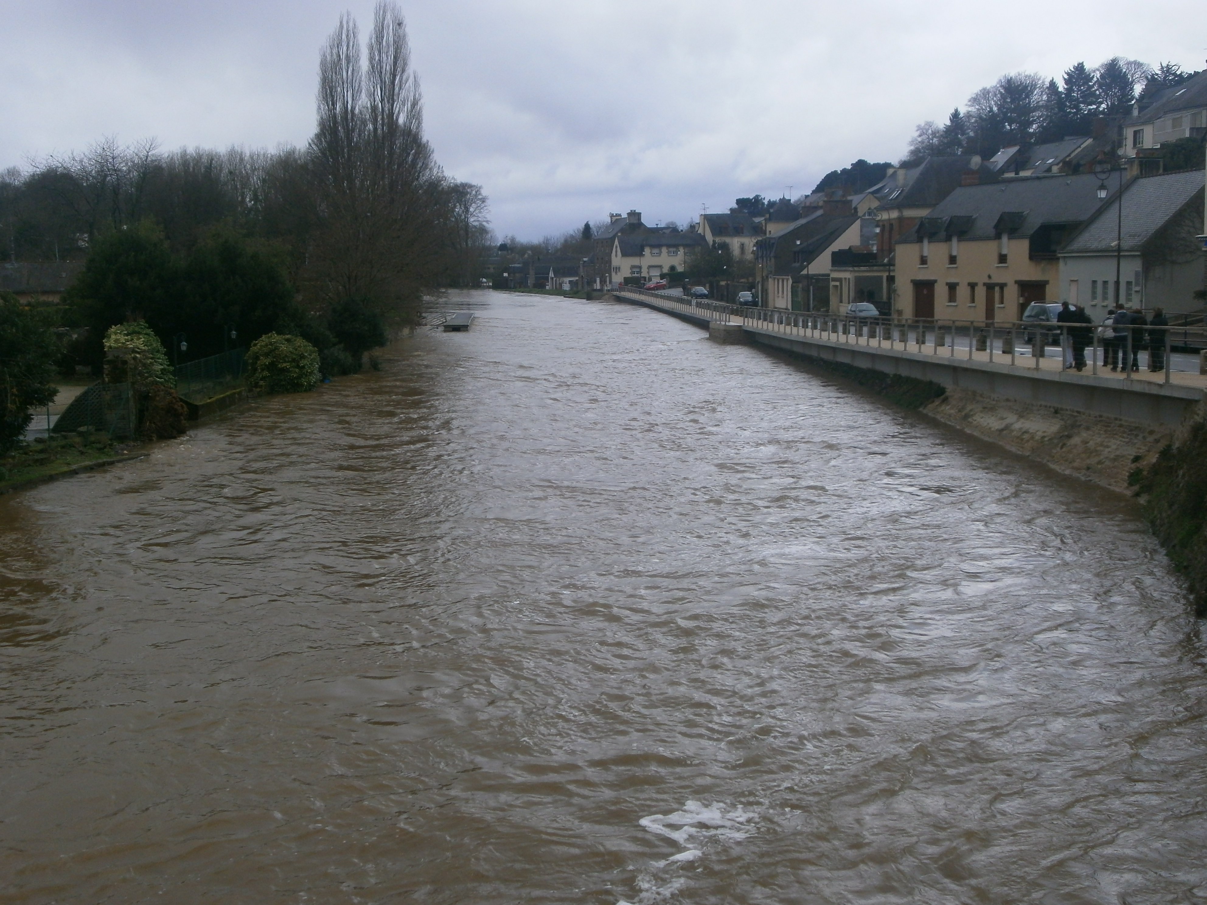 Débordement de la rivière l'Oust à Josselin, le 25 décembre 2013